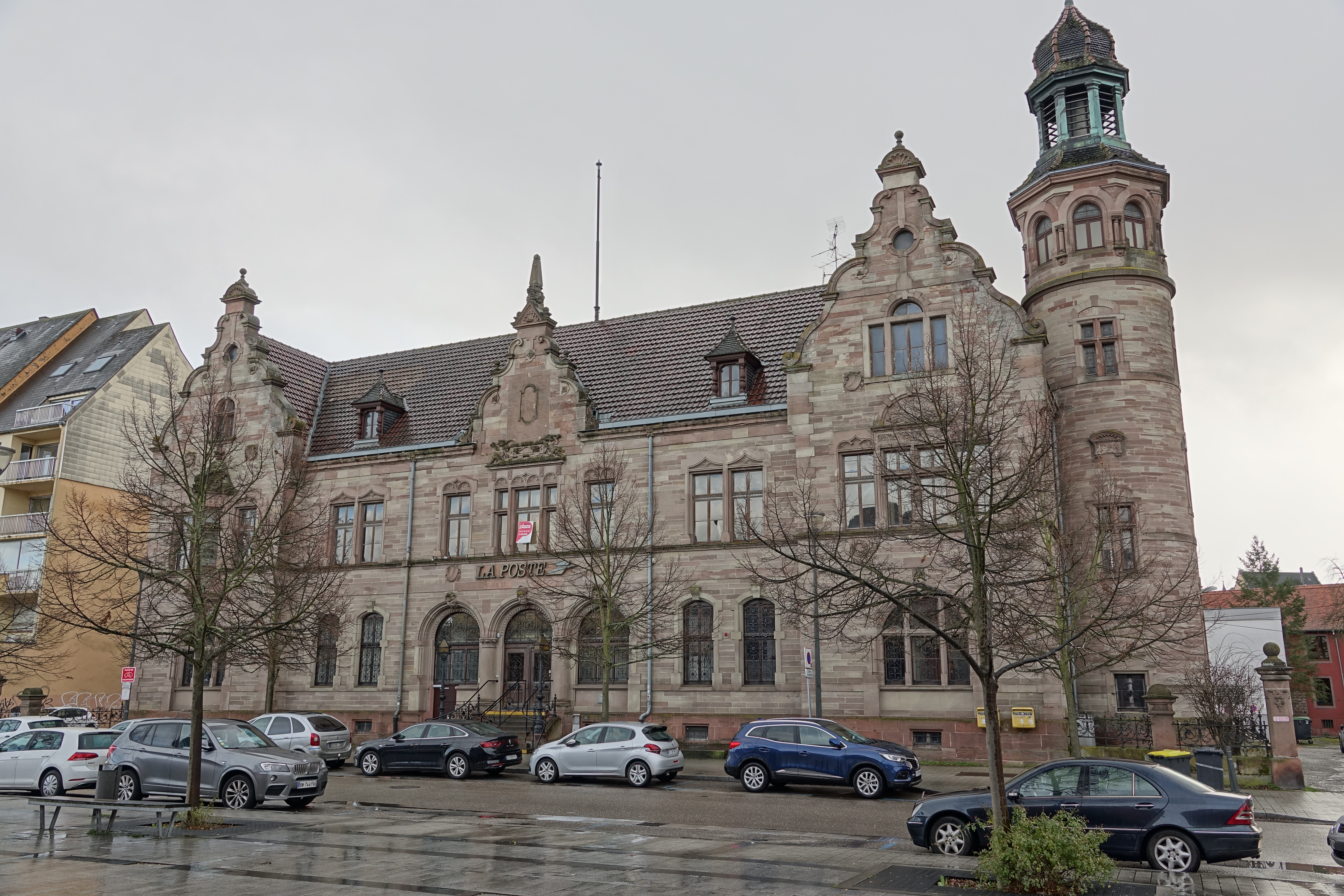 Bâtiment de La Poste à Saverne (Bas-Rhin, France).